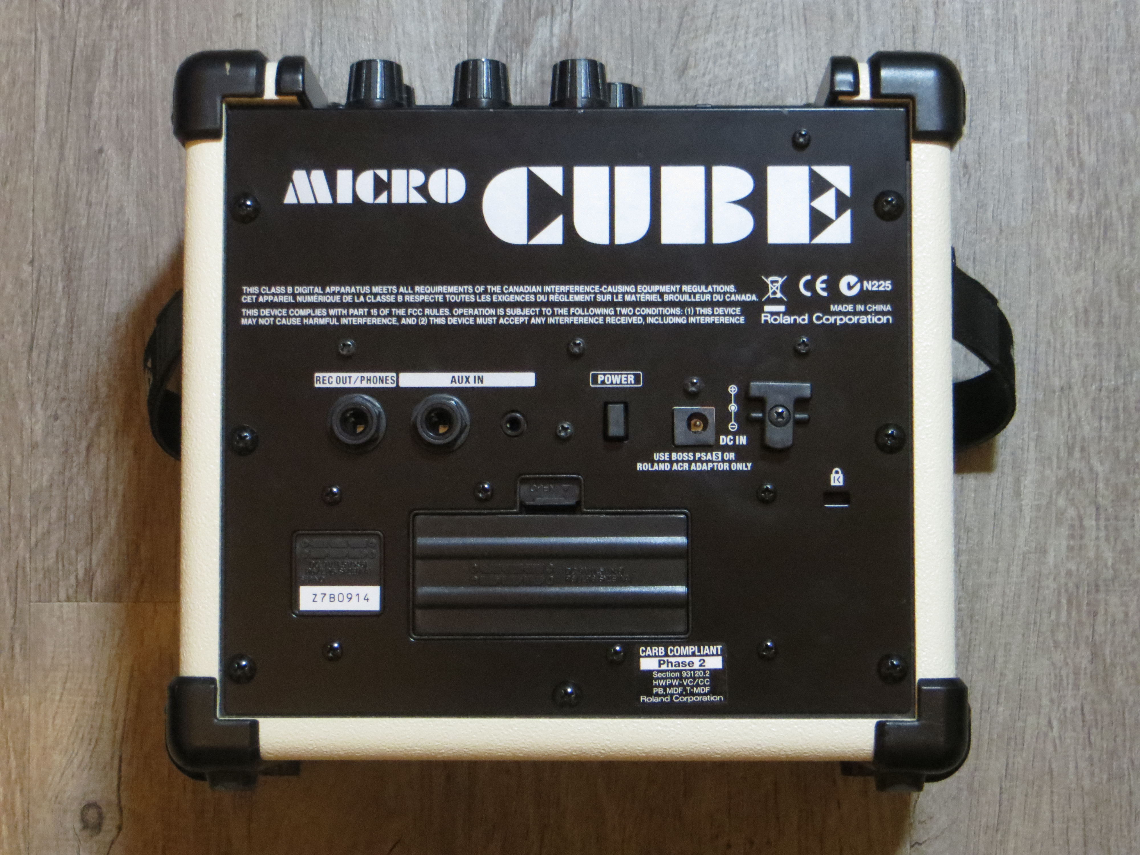 Le panneau arrière de l'amplificateur Roland Micro Cube.